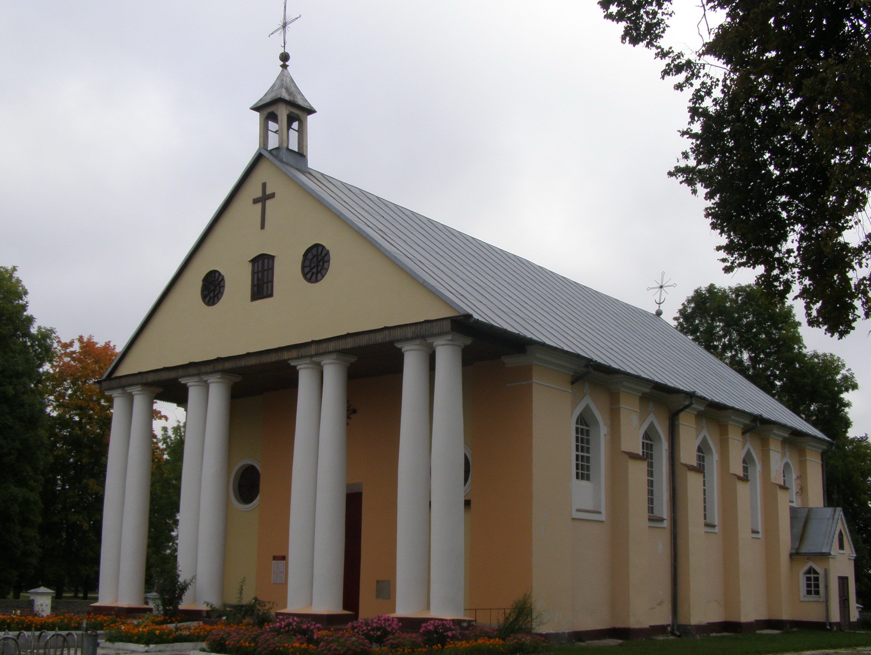 Беларуская (тарашкевіца): Праабражэнскі касьцёлдэкаратыўнае ўбраньне: альтары, амбон, арган. в. Новая Мыш This is a photo of Belarusian heritage monument. Reference number: 112Г000060 ( WLM)